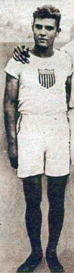 Lee Barnes, le champion olympique du saut à la perche en 1924.